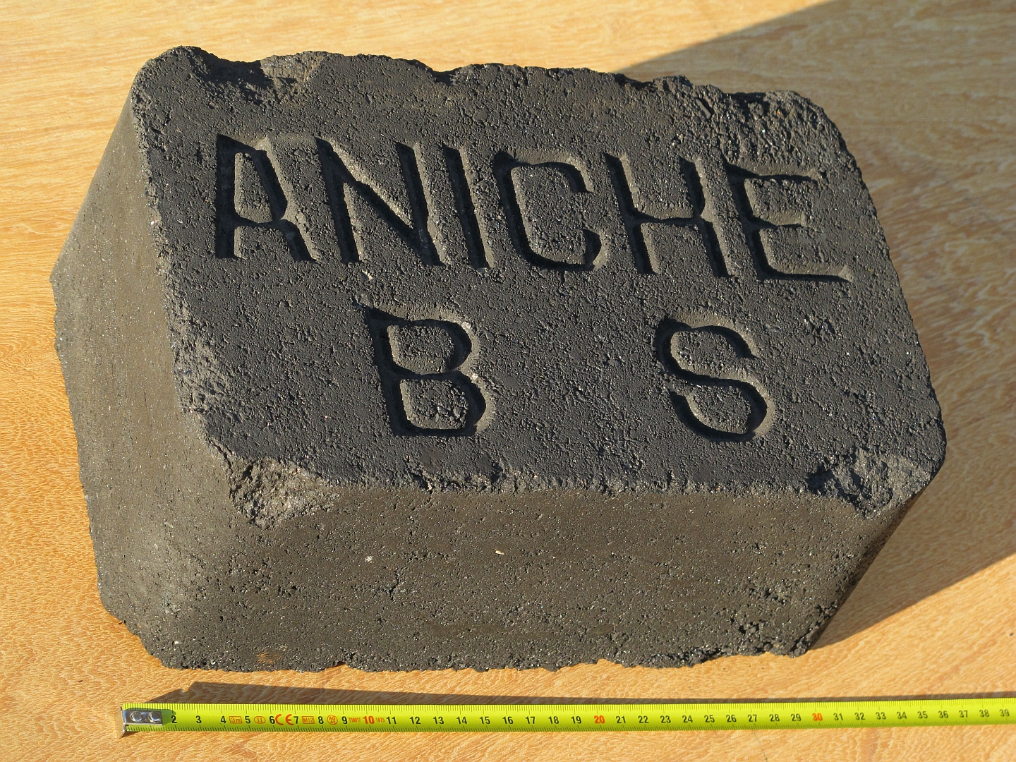 Une briquette de 10 kg de la Compagnie des mines d'Aniche de Somain, autrefois utilisée par les chemins de fer et la marine pour la chauffe des chaudières.